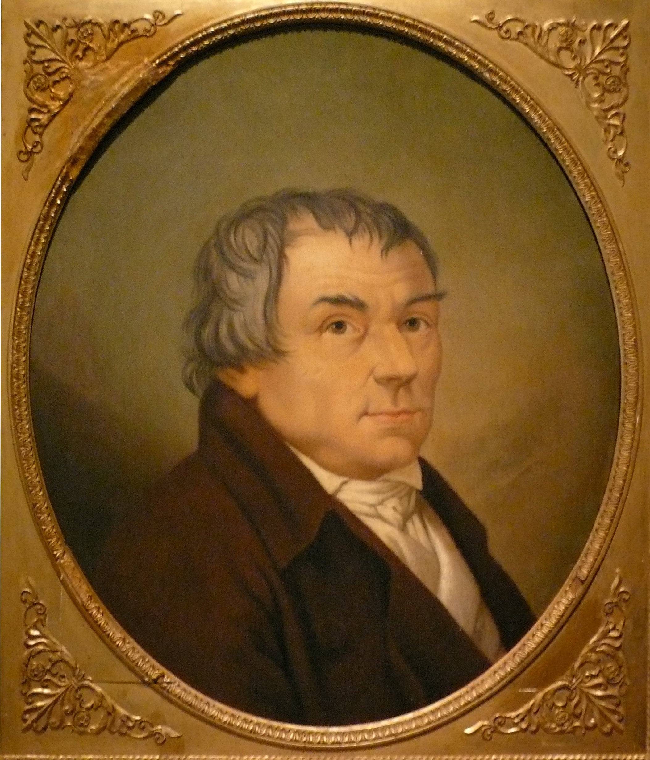 Portrait de François Cacault, ambassadeur à Rome, réalisé par Mlle Malary d'après une gravure et les souvenirs de son père, secrétaire particulier de François Cacault en 1801, huile sur toile